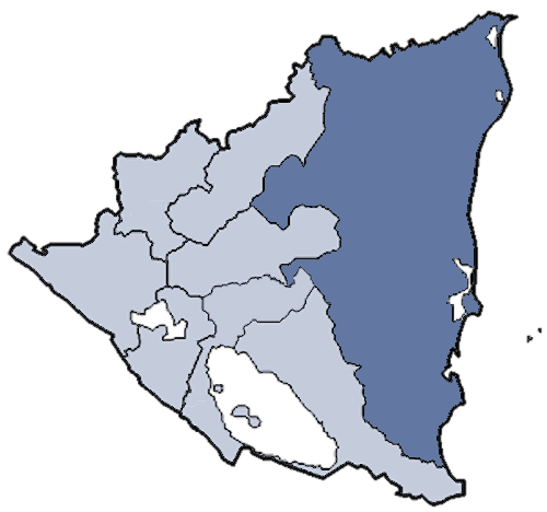 Mappa del vicariato apostolico di Bluefields, in Nicaragua. Lavoro personale eseguito a partire da questa immagine di Commons. Fonte per i confini delle diocesi: Categoria:Chiesa cattolica in Nicaragua